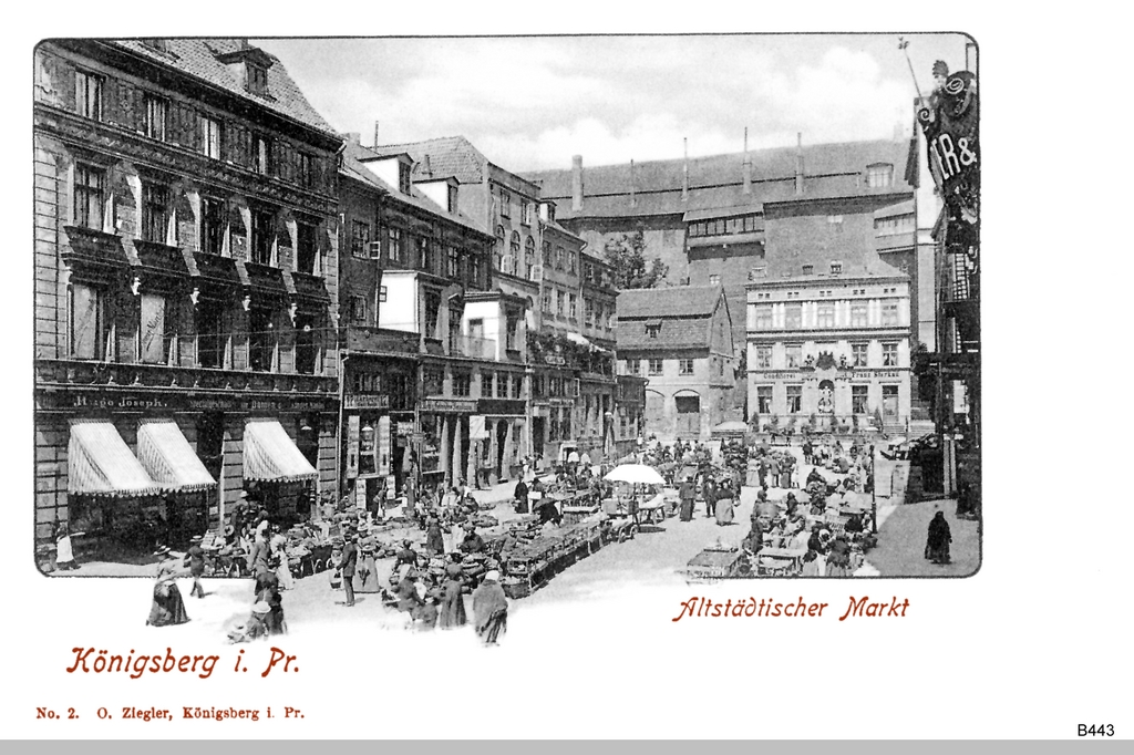 Königsberg